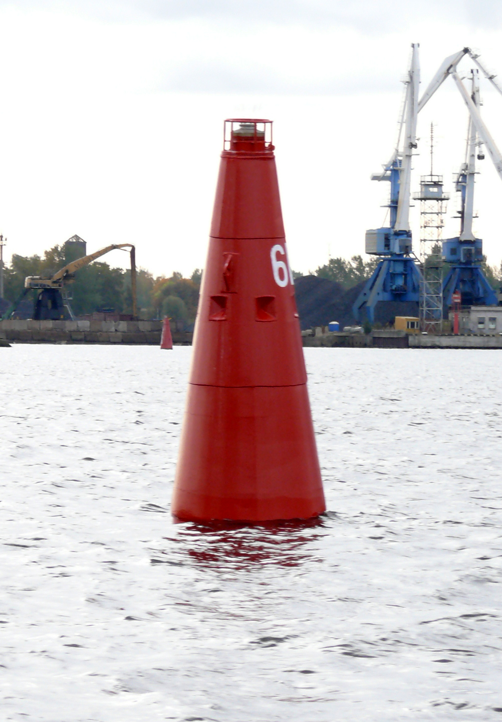 Kuģu ceļa boja Rīgas brīvostas akvatorijā, Daugavā.